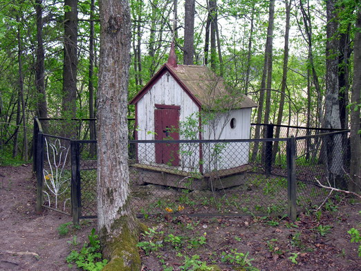 Liūdėnų kaimo koplytėlė, Mažeikių raj., Šerkšnėnų sen. Foto: Algirdas, 2006 m. gegužės 16 d.